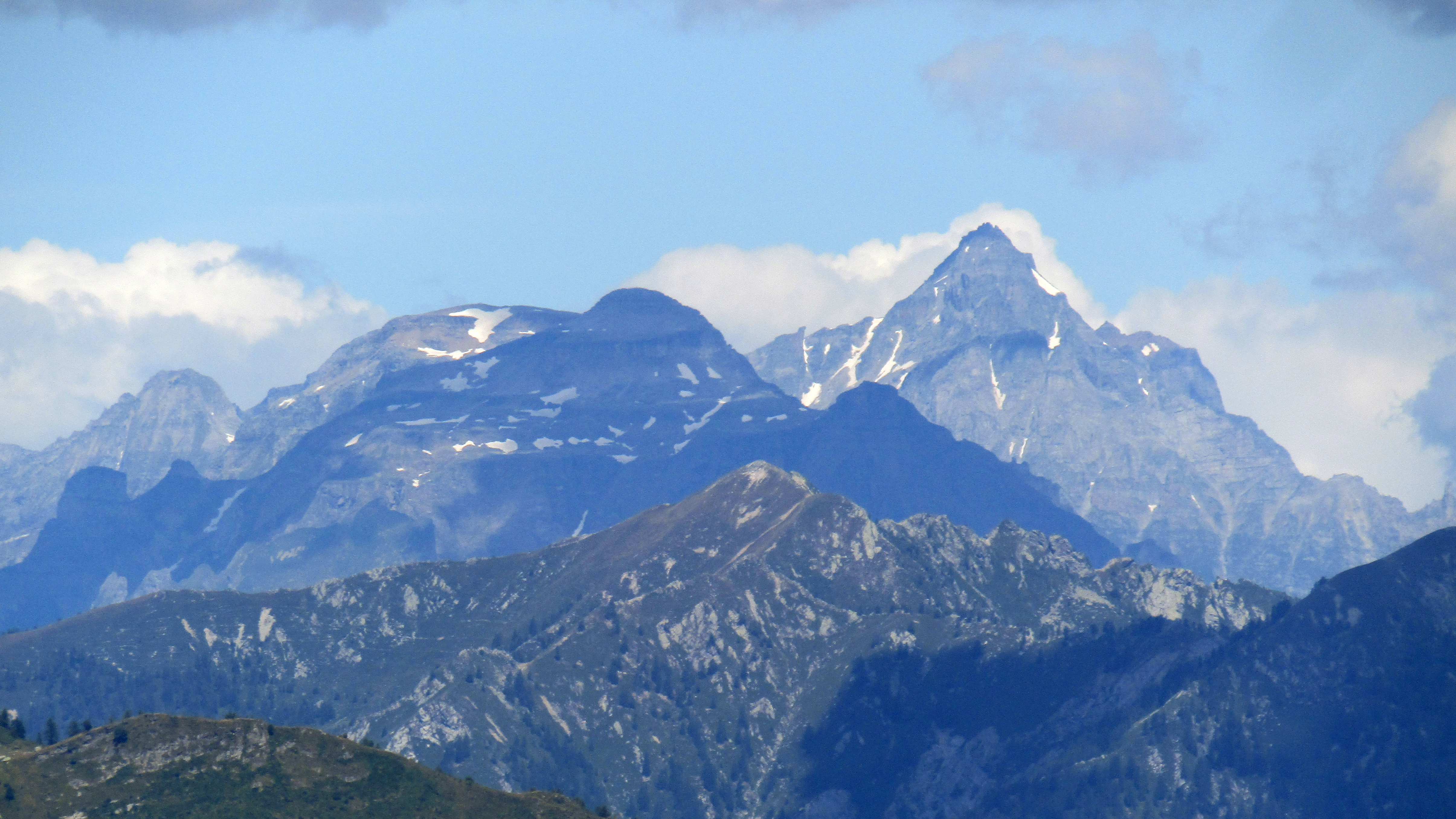 Helsenhorn, Monte Cistella e Pizzo Diei visti dal Monte Spalavera (Alpi Lepontine)